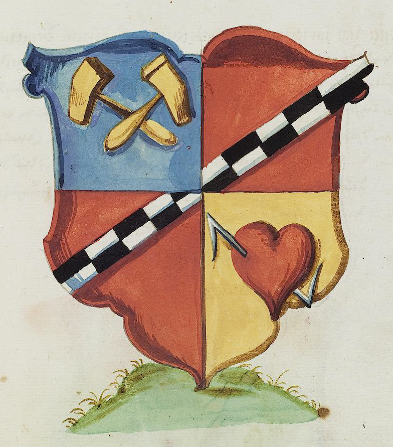 Wappen aus: David Wolleber: Chorographia Württemberg, [Schorndorf] 1591, Universitätsbibliothek Tübingen, Mh 6,1 Wappen Kloster Murrhardt